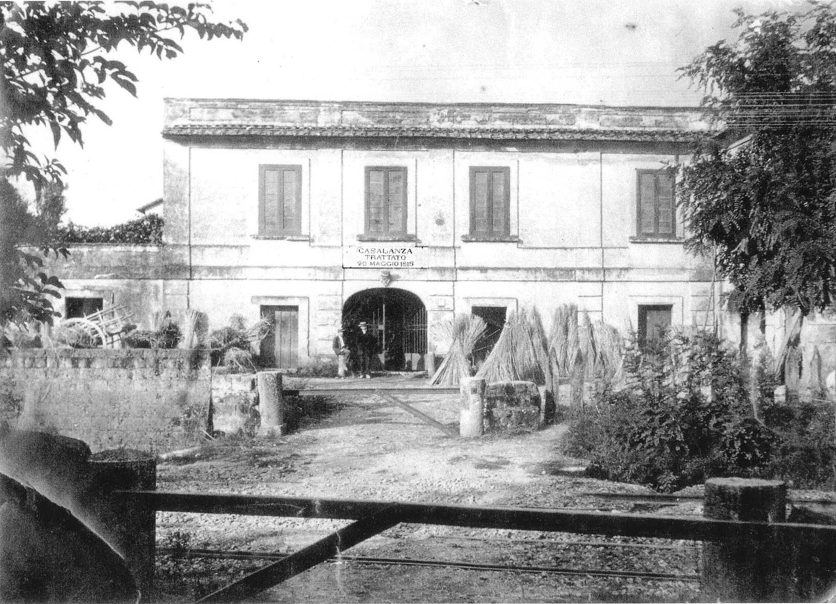 Casa Lanza, presso Capua, in cui il 20 maggio 1815 venne stipulato l'omonimo "Trattato di Casalanza" che restituì il Regno di Napoli ai Borbone e spodestò Gioacchino Murat, cognato di Napoleone Bonaparte.